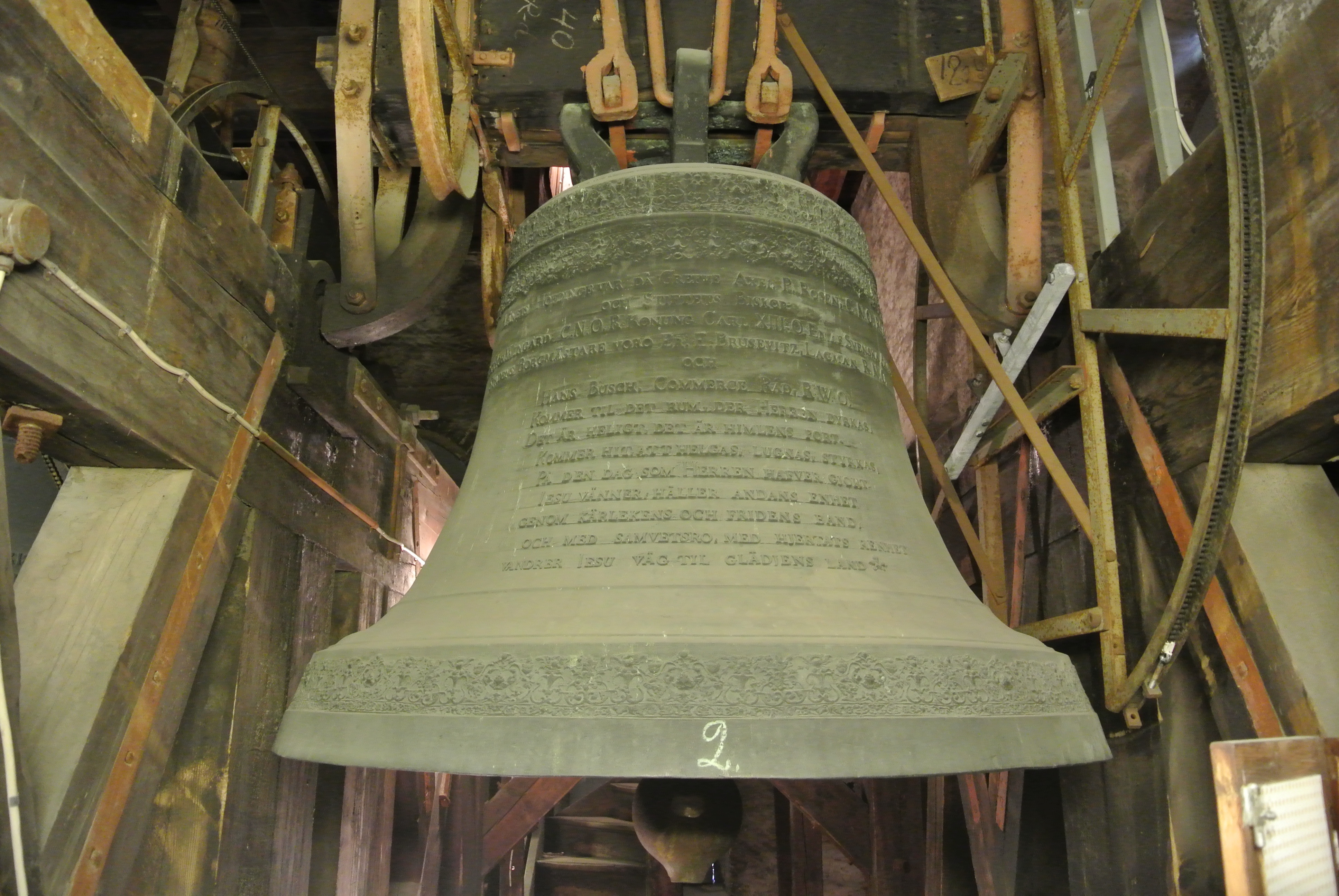 Söndagsklockan i Göteborgs domkyrka